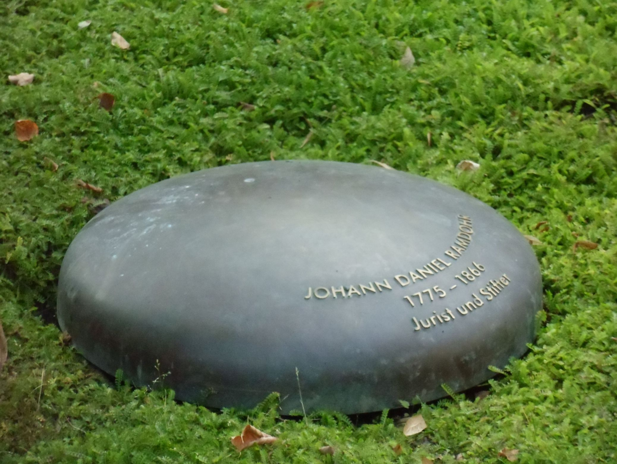 Bodendenkmal im Stadtpark Aschersleben